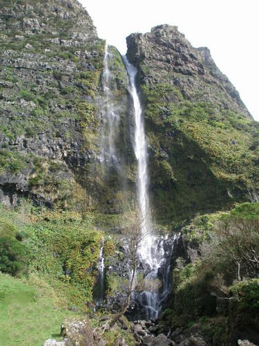 Cascata do Poço do Bacalhau que corre para a logoa do mesmo nome, ilha das Flores, Açores, Portugal